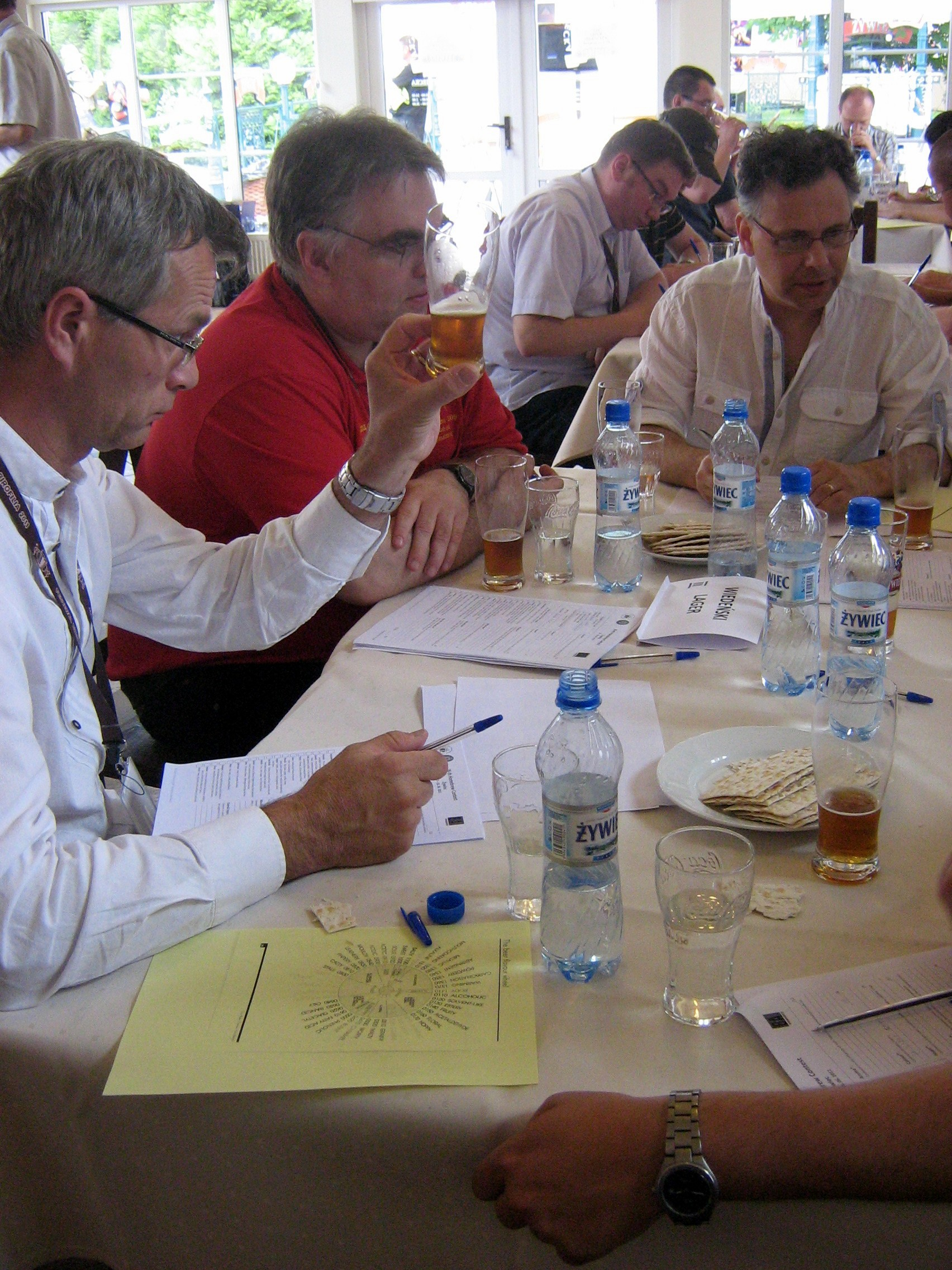 obrady komisji